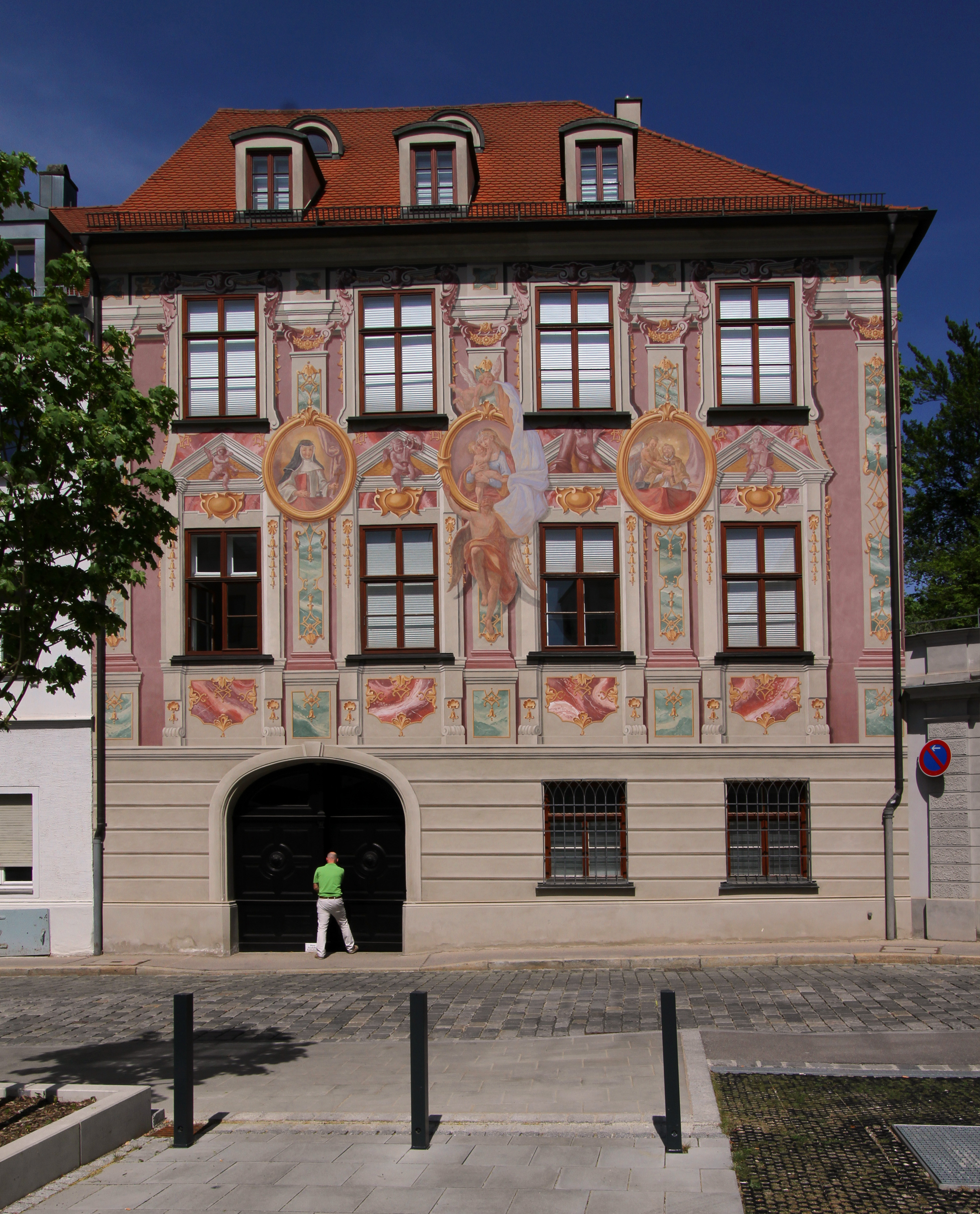 Bürgerhaus, sogenanntes Kathan-Haus, Kapuzinergasse 10 in Augsburg. Zwei dreigeschossige rechtwinklig zueinander stehende Flügel mit Walmdach und gewölbter Tordurchfahrt, im Westen zweigeschossige Abseite mit Fachwerksalettl und Aufzuggiebel, im Kern 17. Jahrhundert, reiche Fassadenmalerei zweite Hälfte 18. Jahrhundert. Rückgebäude, zweigeschossiger Walmdachbau. 73″ N, 10° 53′ 53.64″ E